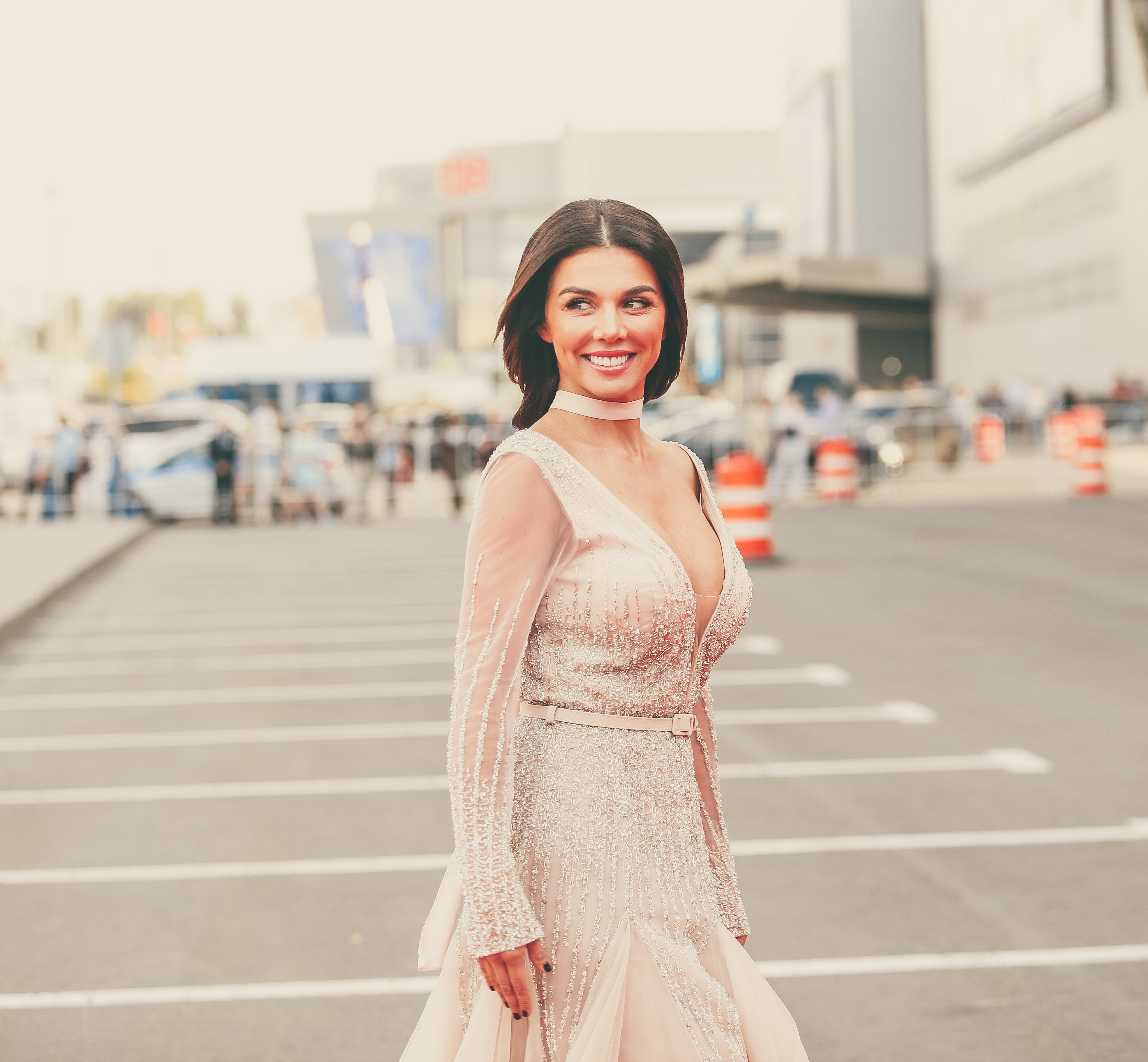 Анна Седокова на премии телеканала «RU.TV 2016» в Москве